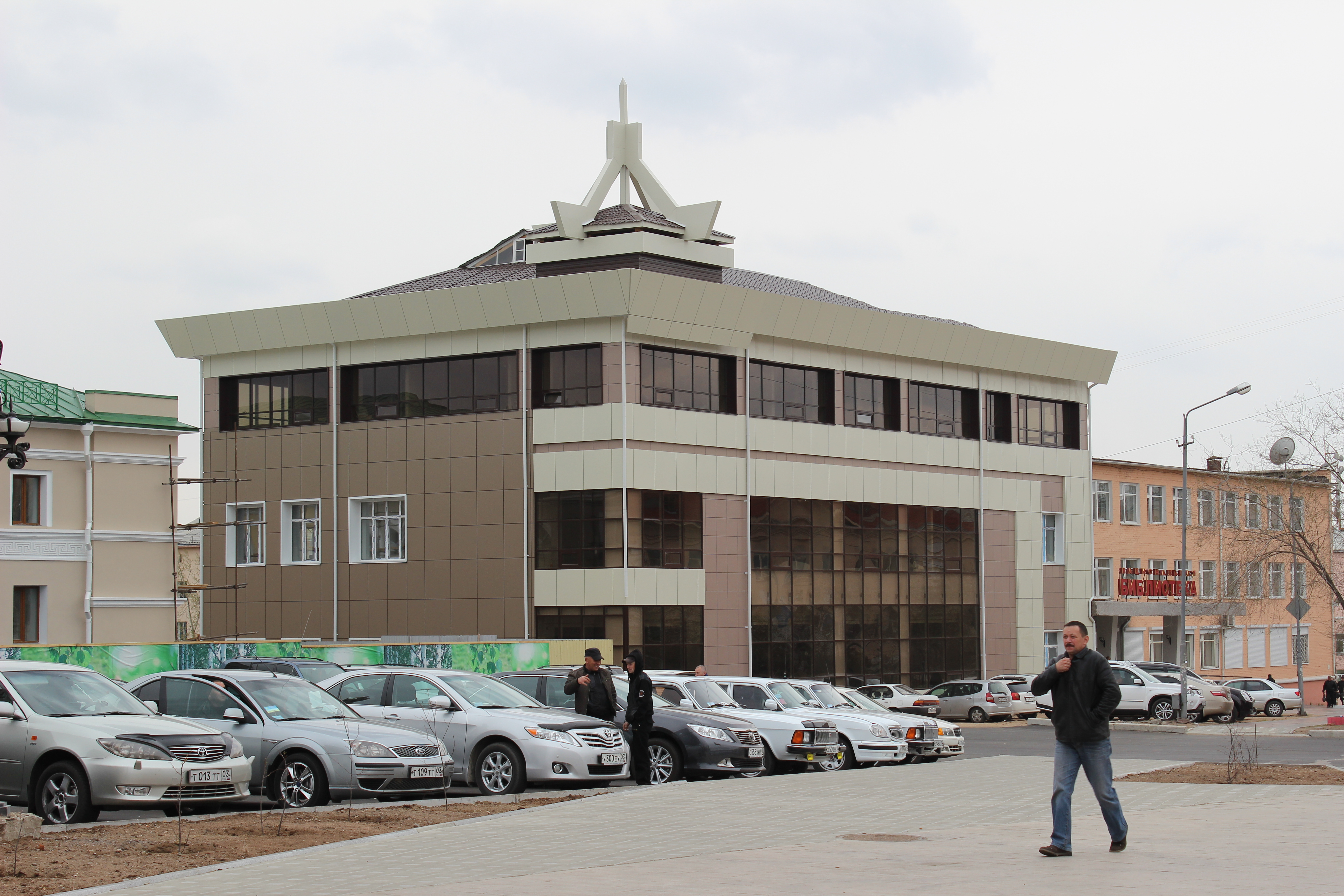 Национальная библиотека Бурятии имени Максима Горького, г. Улан-Удэ